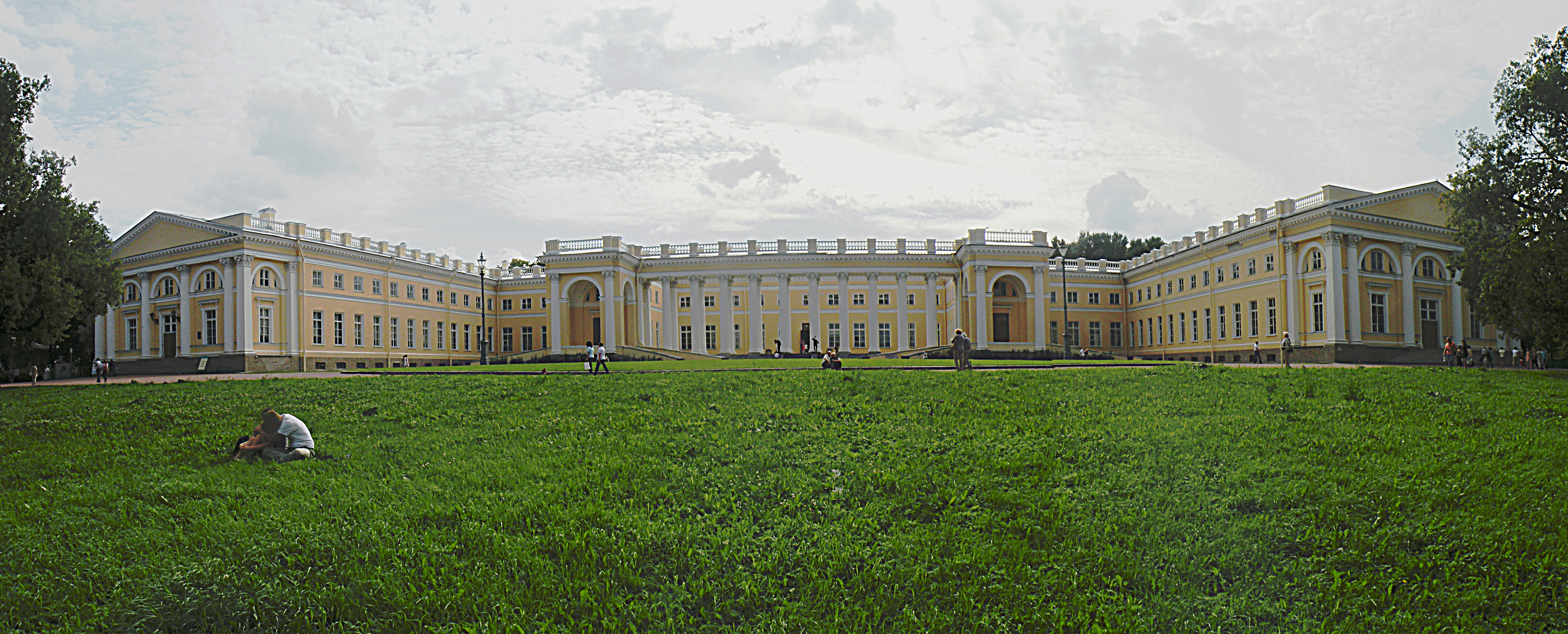 Дворец Александровский (со статуями) (Санкт-Петербург и Лен.область, Пушкин, Дворцовая улица, 2, главный фасад)